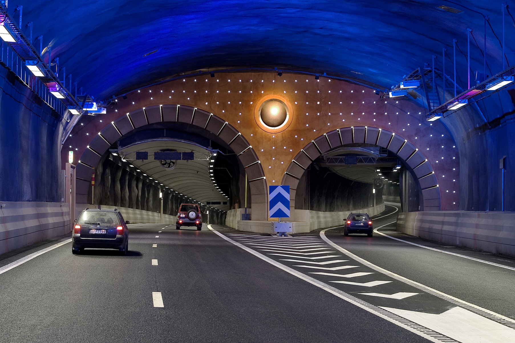 Södra Länken i Stockholm, Konstnär: Leif Bolter